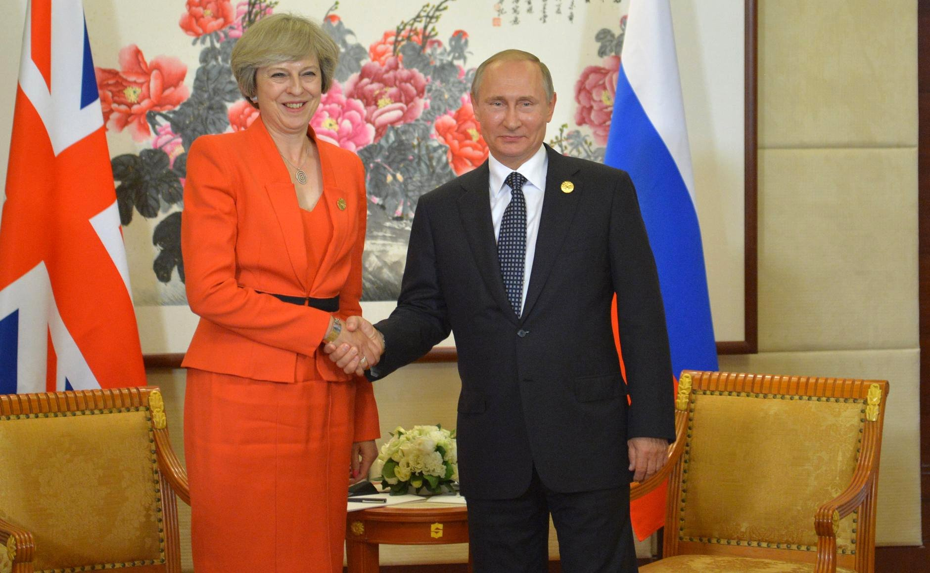 Президент России Владимир Путин с Премьер-министром Великобритании Терезой Мэй